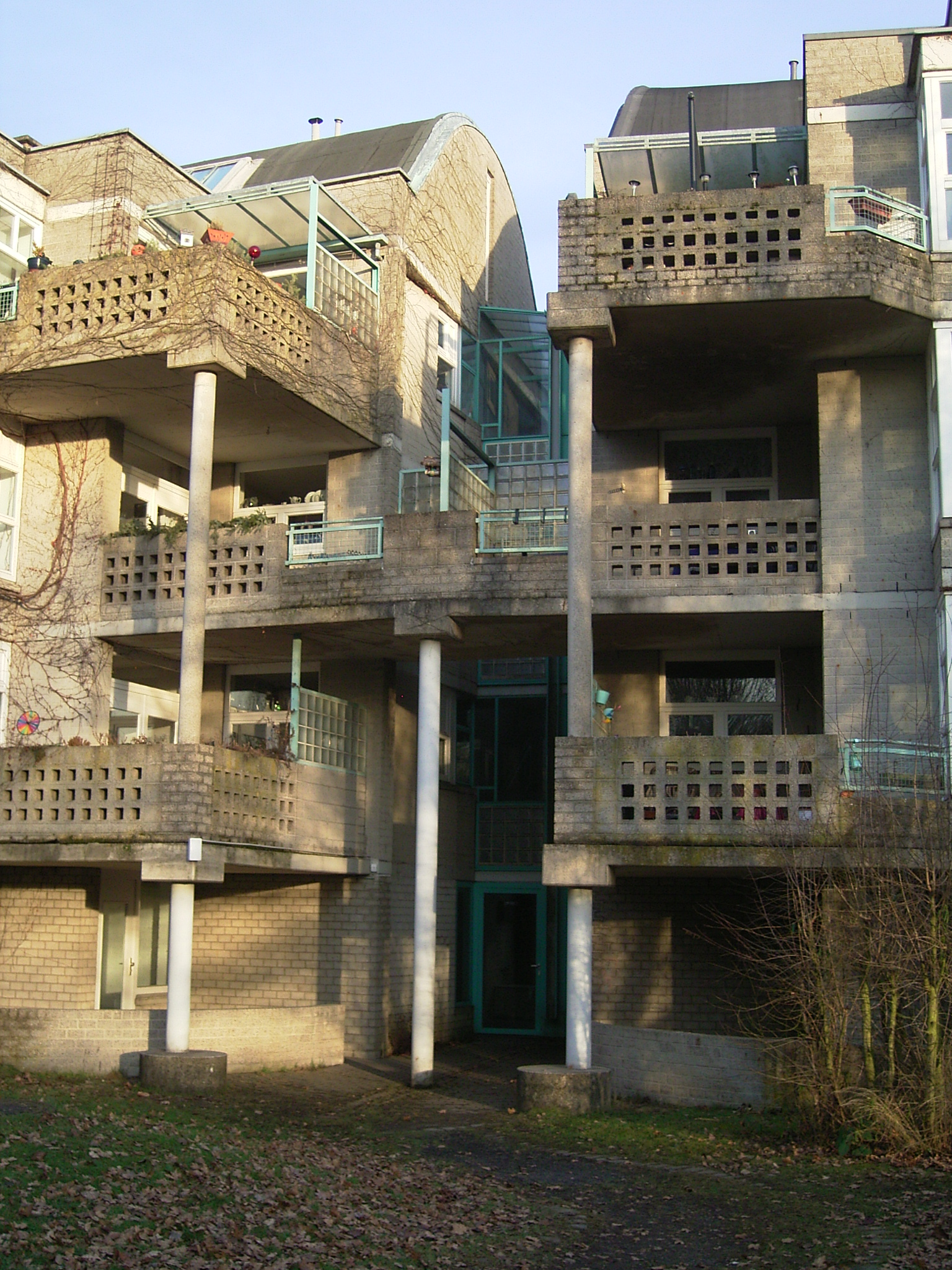 documenta urbana Wohngebäude in Kassel 1979-1982. Herman Hertzberger